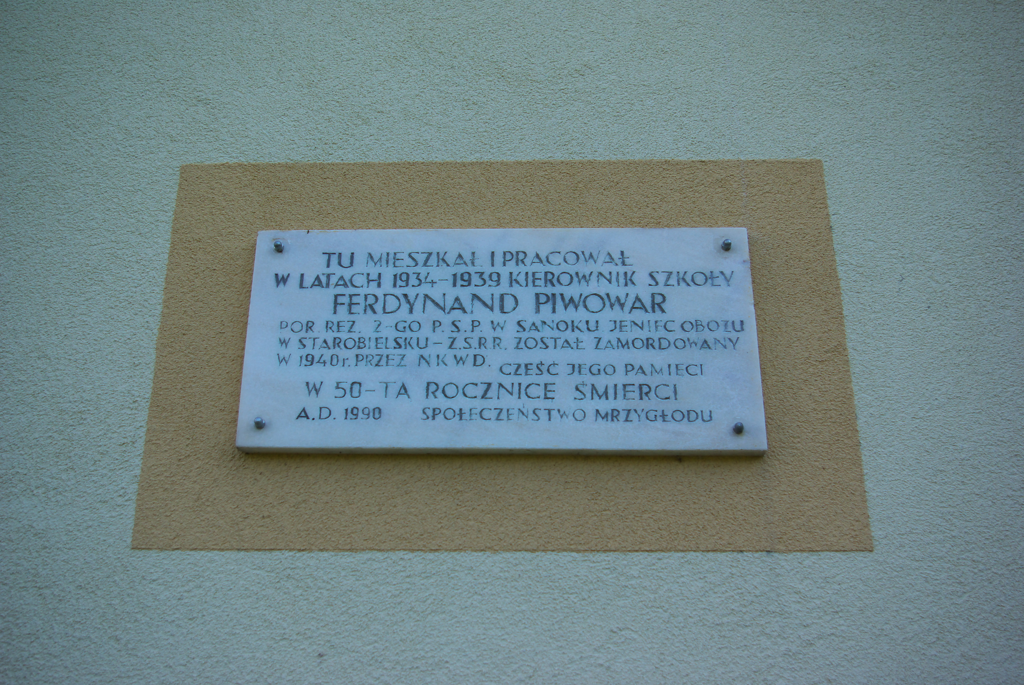 Szkoła podstawowa im. Króla Władysława Jagiełły w Mrzygłodzie. Tablica pamiątkowa Ferdynanda Piwowara